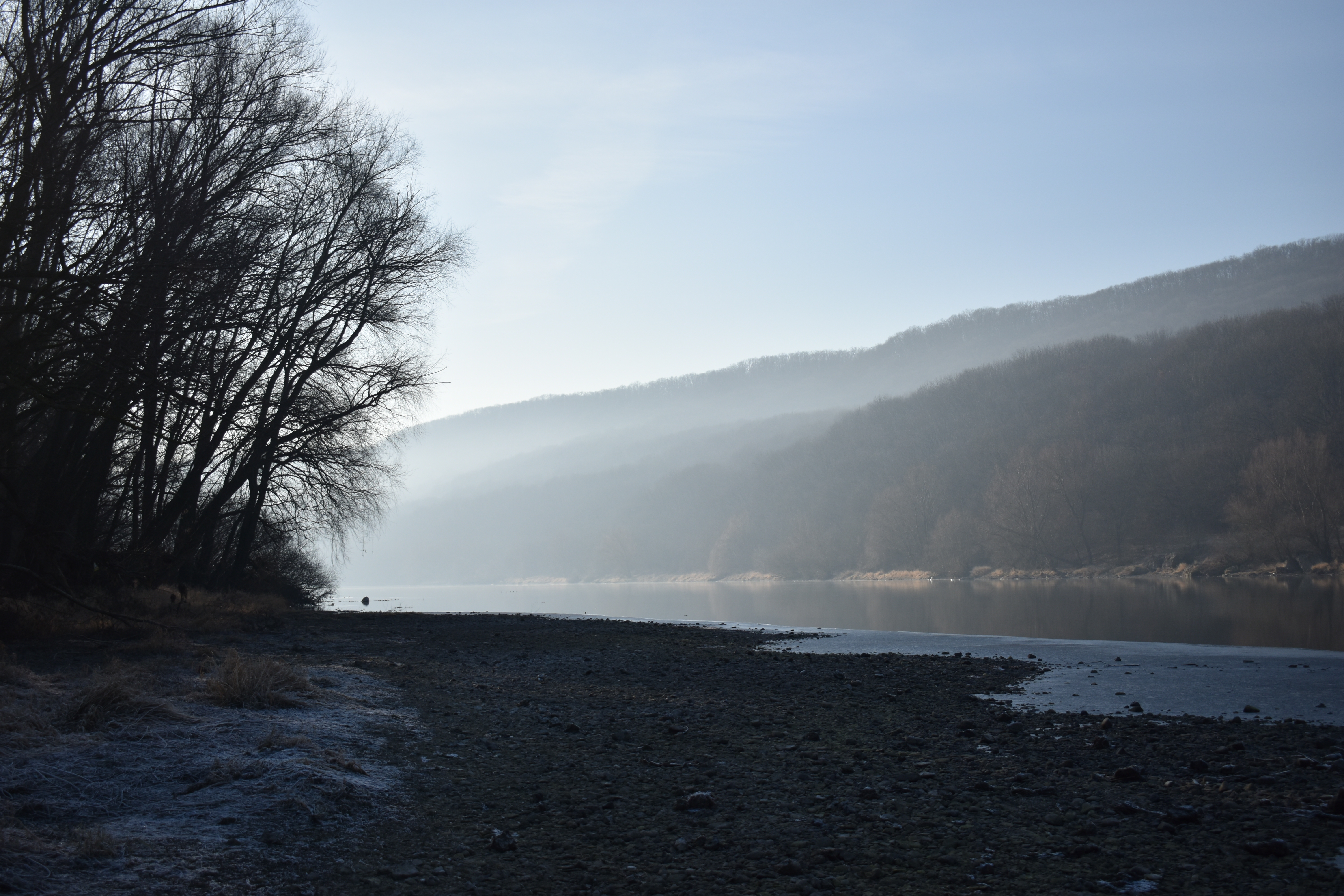 Регіональний ландшафтний парк "Дністер" в районі с. Садківці Могилів-Подільського району Вінницької області